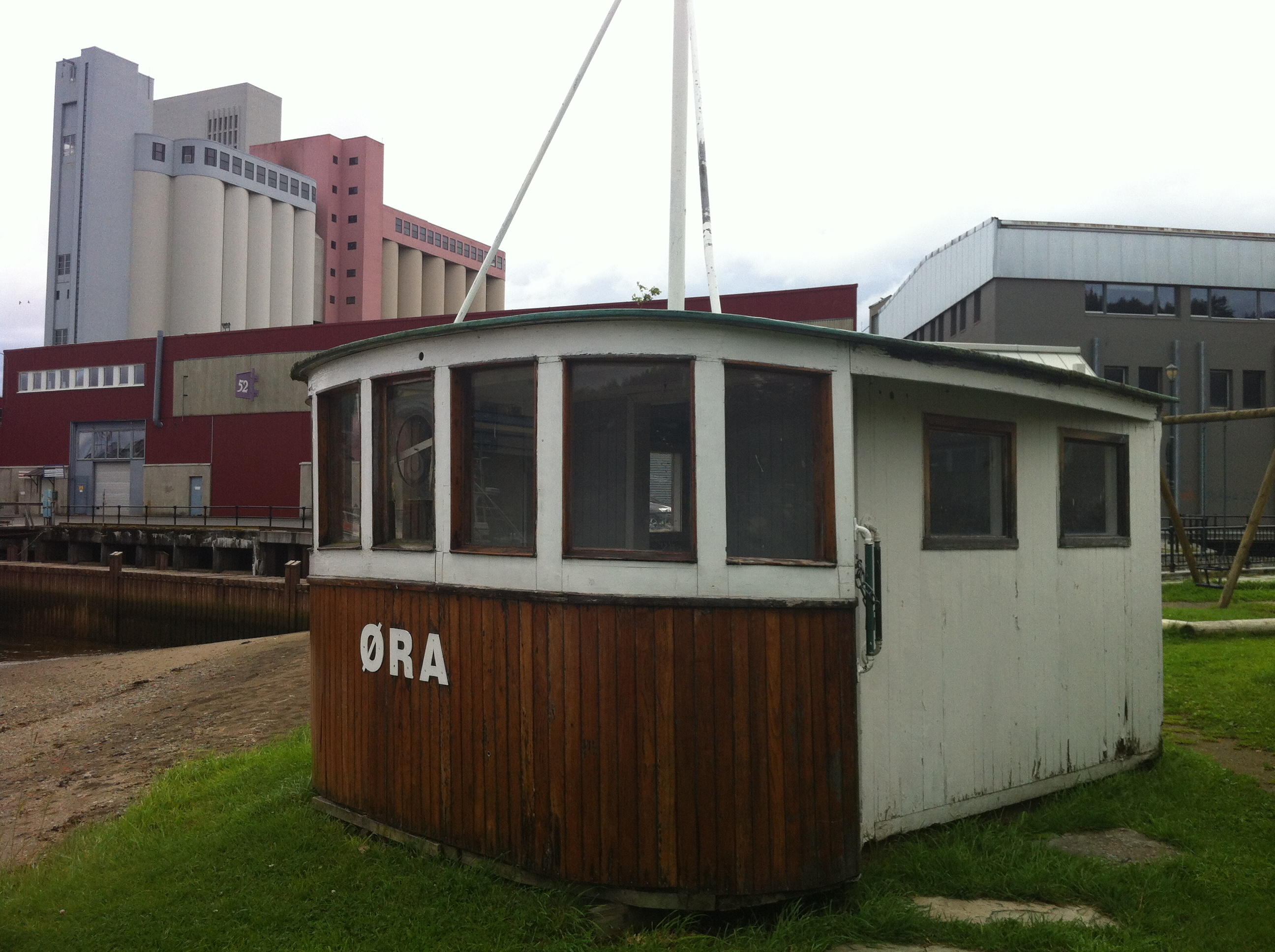 Norsk (bokmål): Bildet er fra "Nersia" i Ilsvikøra, Trondheim